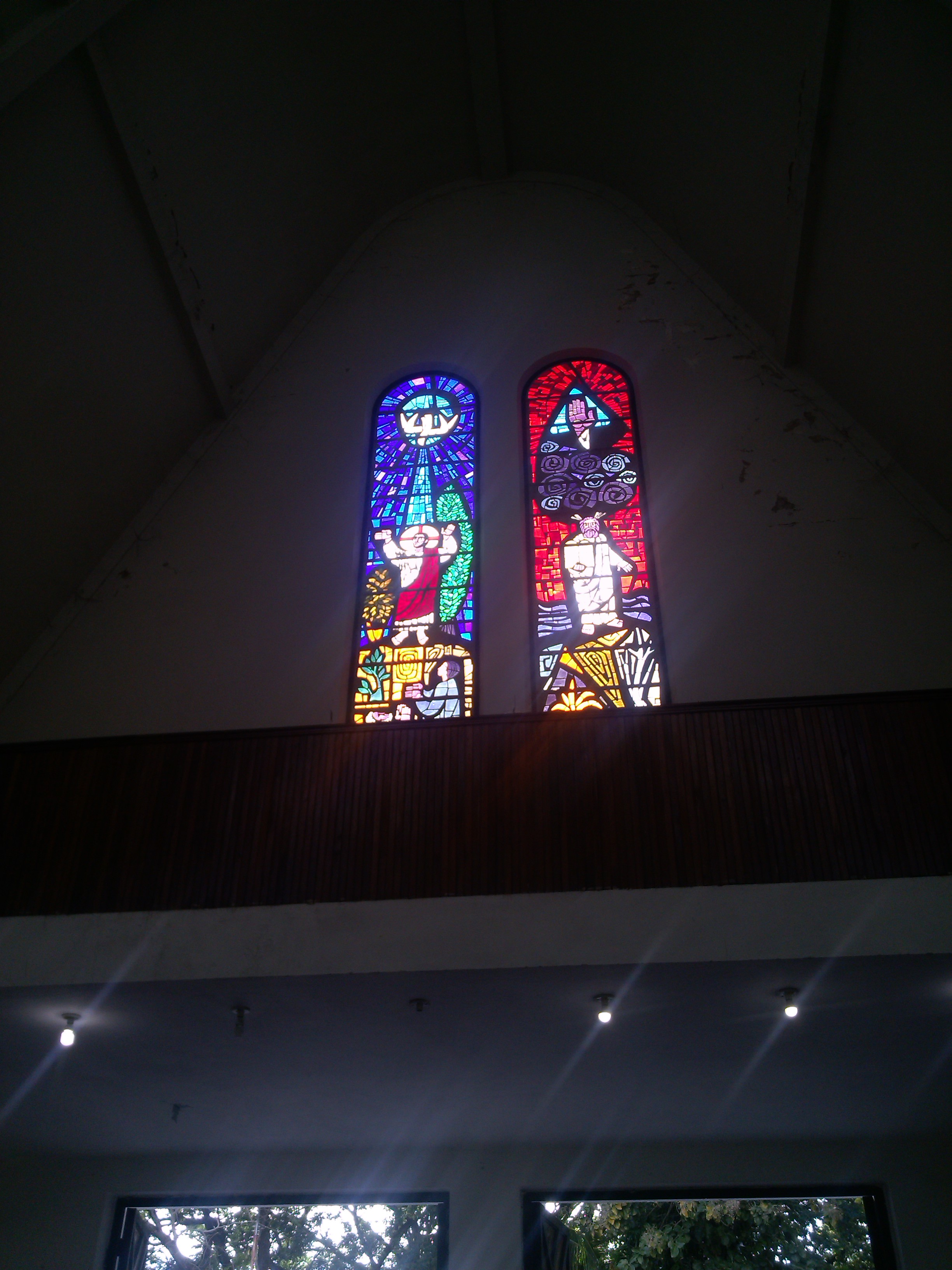 Vitrales que muestran a Jesus y personajes de la Fe Cristiana.